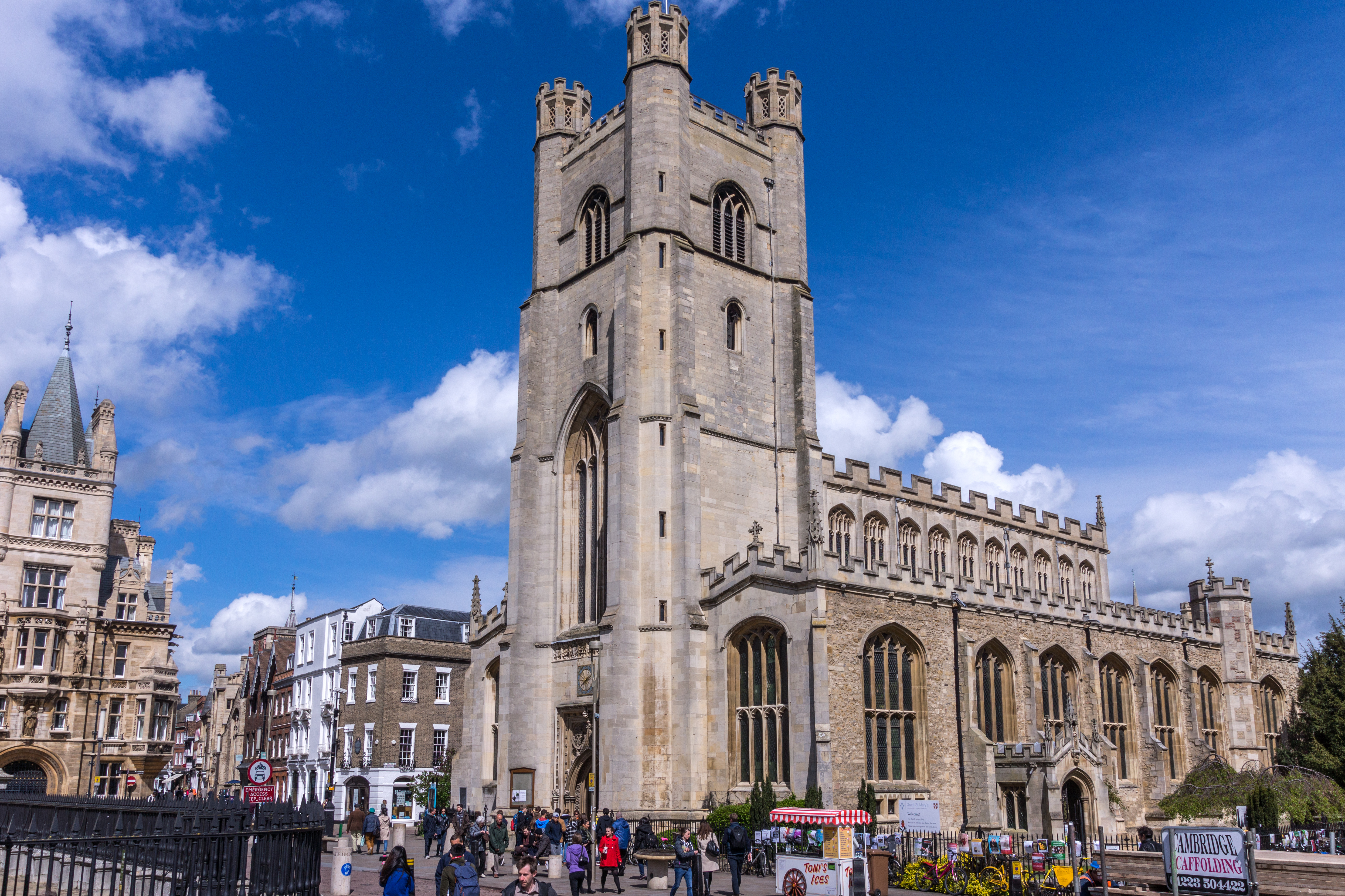 Eglise St Mary the Great à Cambridge